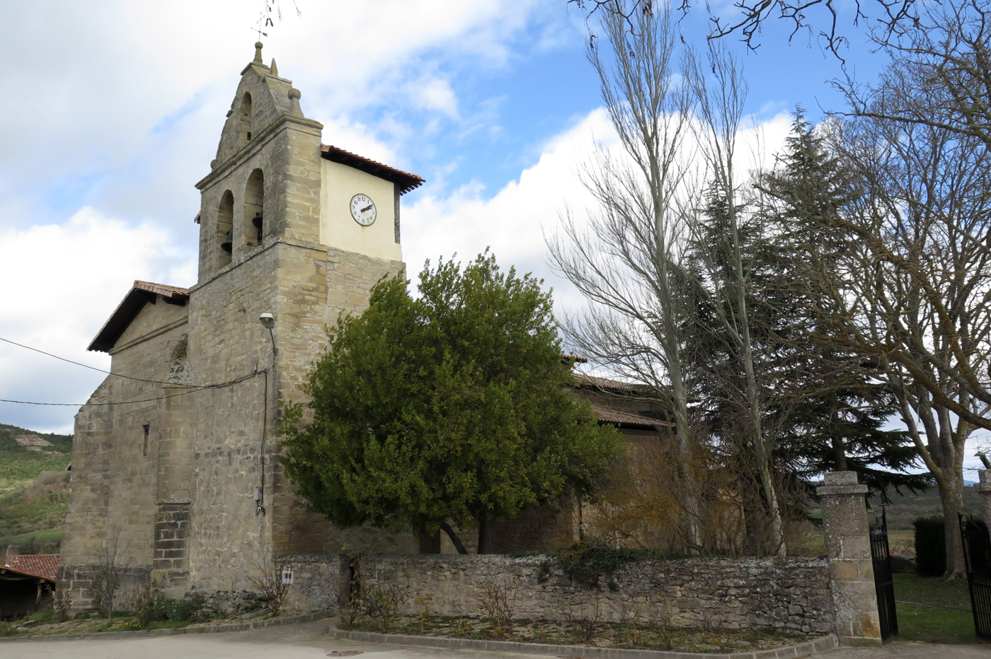 Iglesia del pueblo de Turiso (Lantarón), Álava (España)